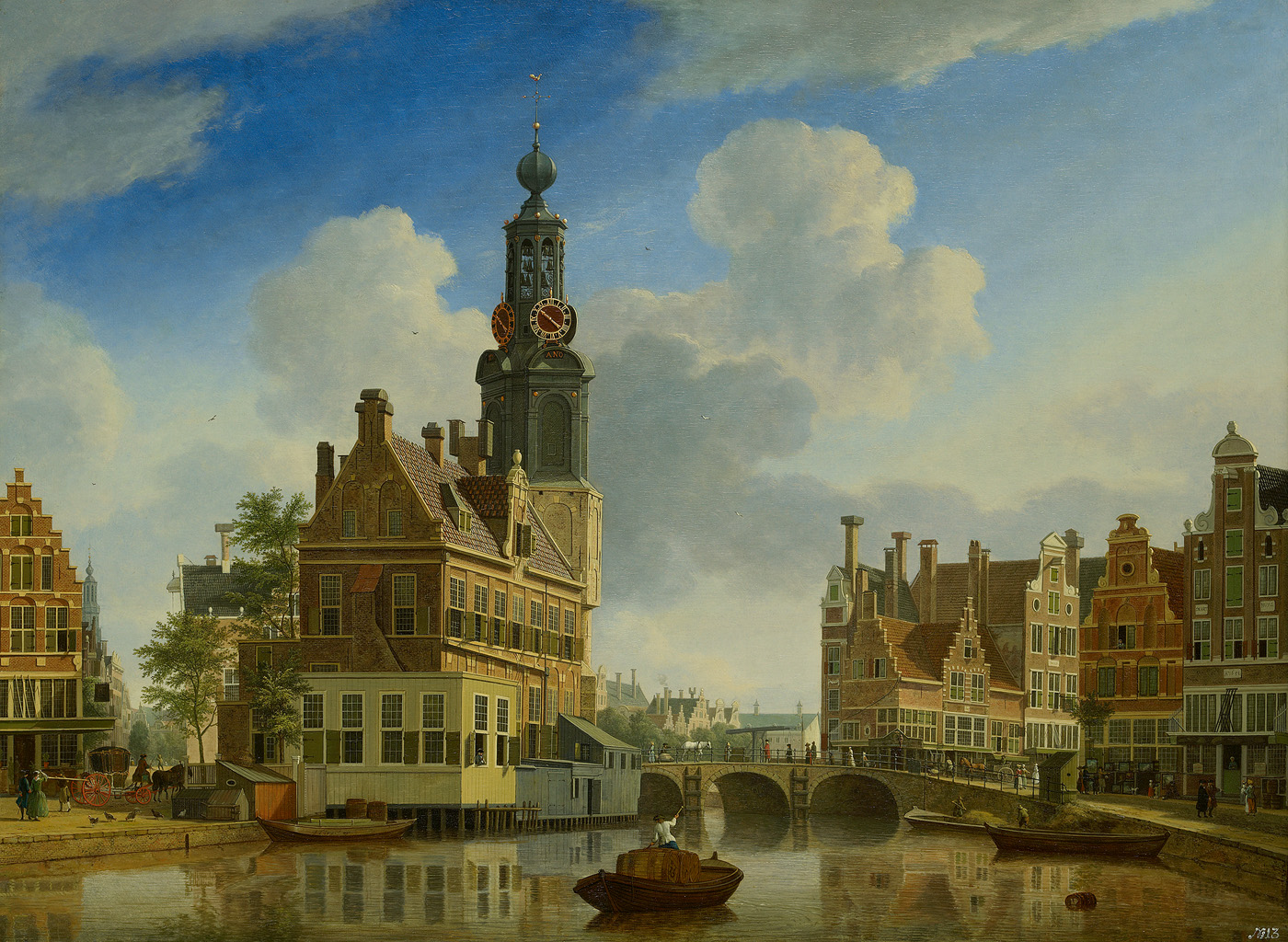 schilderij; stadsgezicht; stadsgezicht Amsterdam; Munttoren; Singel; Muntplein